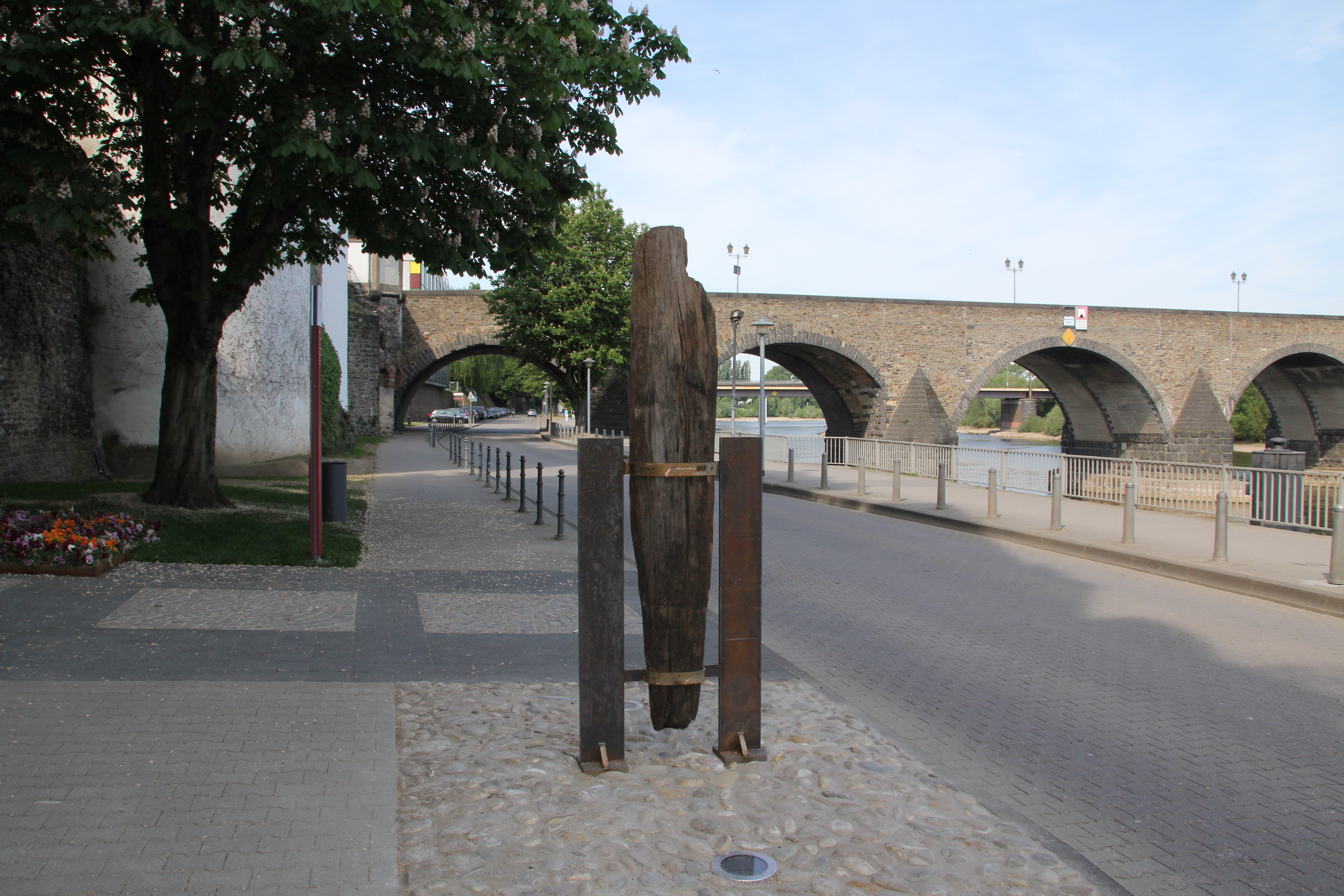 Koblenz im Buga-Jahr 2011 - Ausgesteller Pfahlrest der römischen Moselbrücke in den Moselanlagen